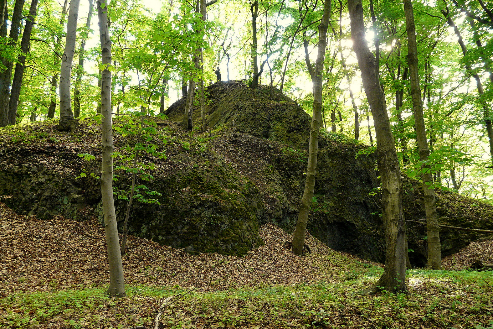 Vrcholový vulkanit Lipového vrchu, Housecké vrchy